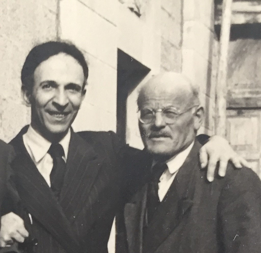 Immagine fotografata dall'album di famiglia che ne ha autorizzato l'uso.